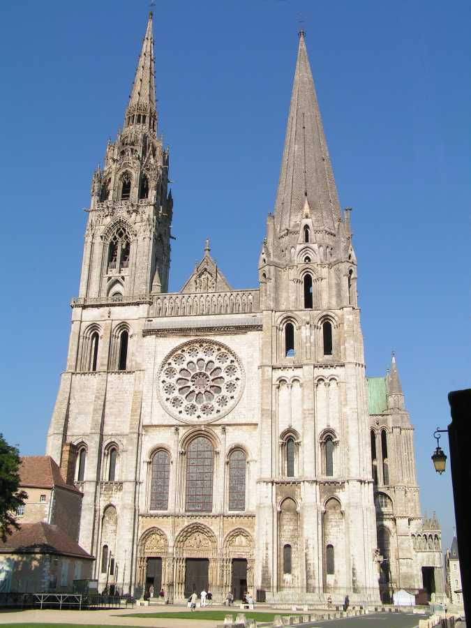 cathédrale de Chartres, la façade ouest, Eure-et-Loir (France). Photo : Roby